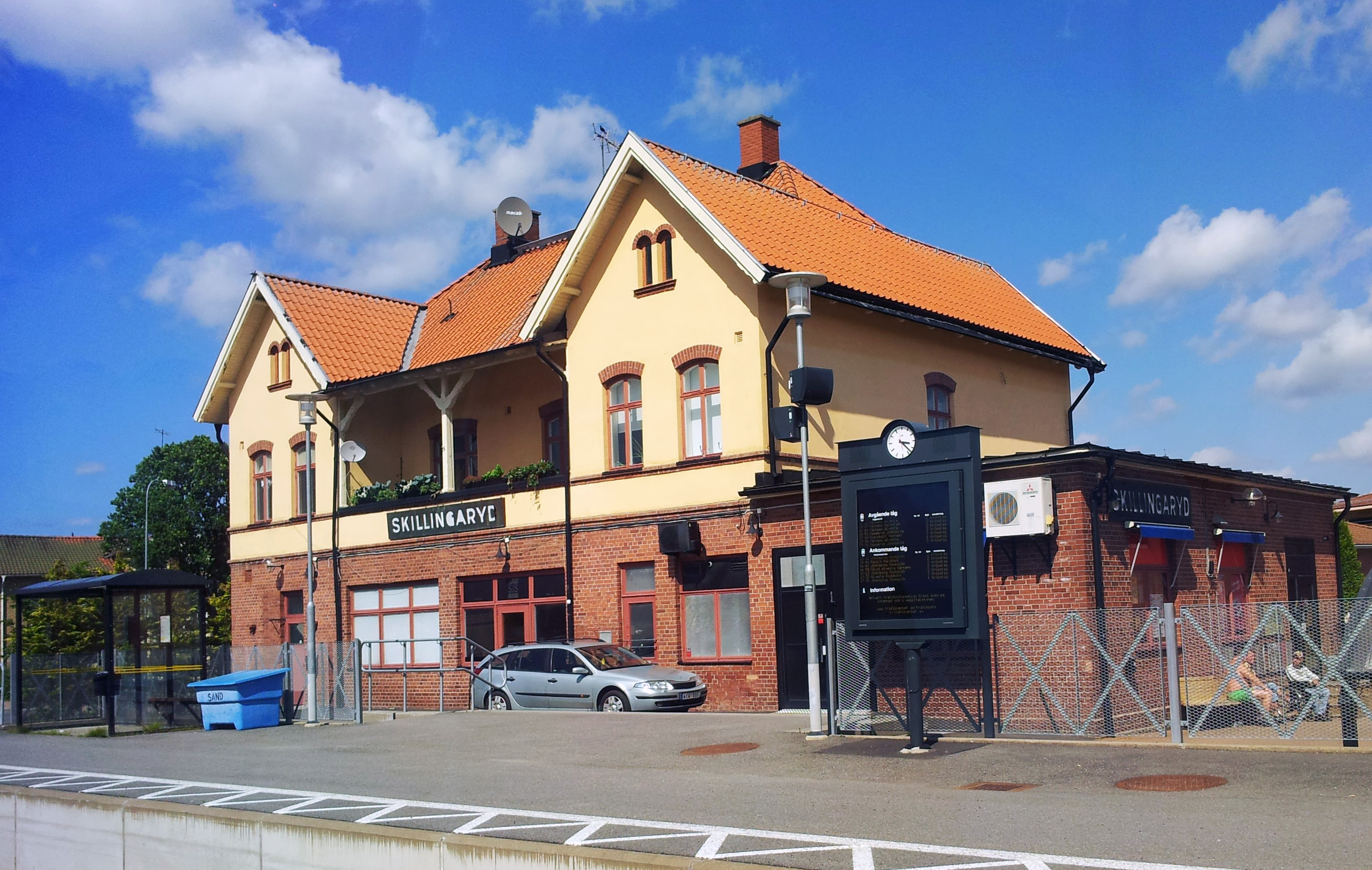 Skillingaryds station, från tåget. Juli 2013